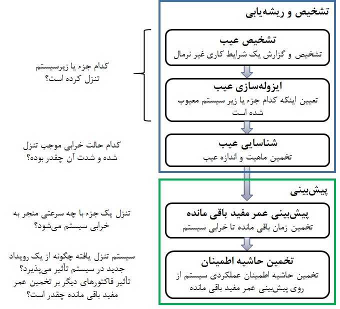 روند تشخیص، شناسایی و پیشبینی عیوب